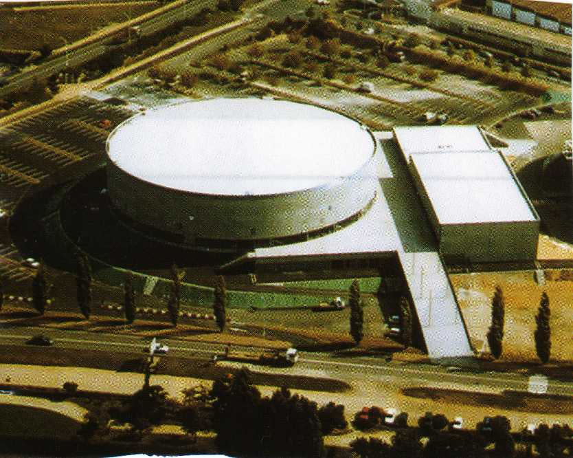 Salle de basket-ball "le Colisée"